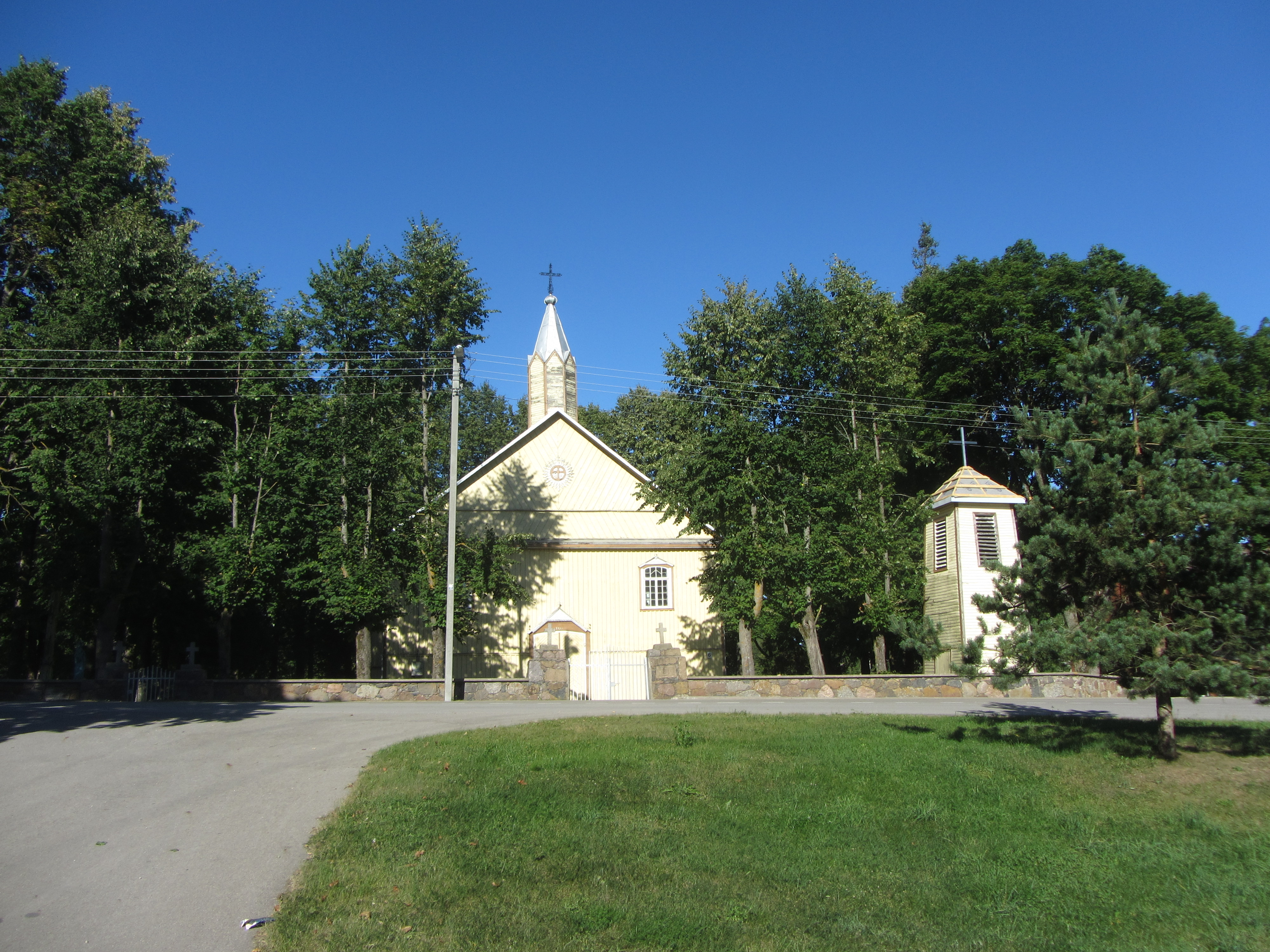 Adomynė, Lithuania